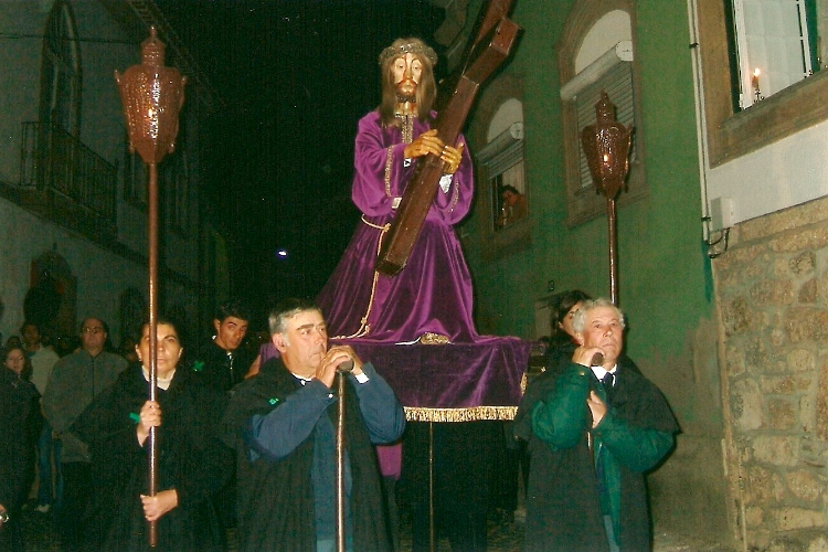 Senhor dos Passos na procissão do encontro, 5ª-Feira Santa - Proença-a-Velha